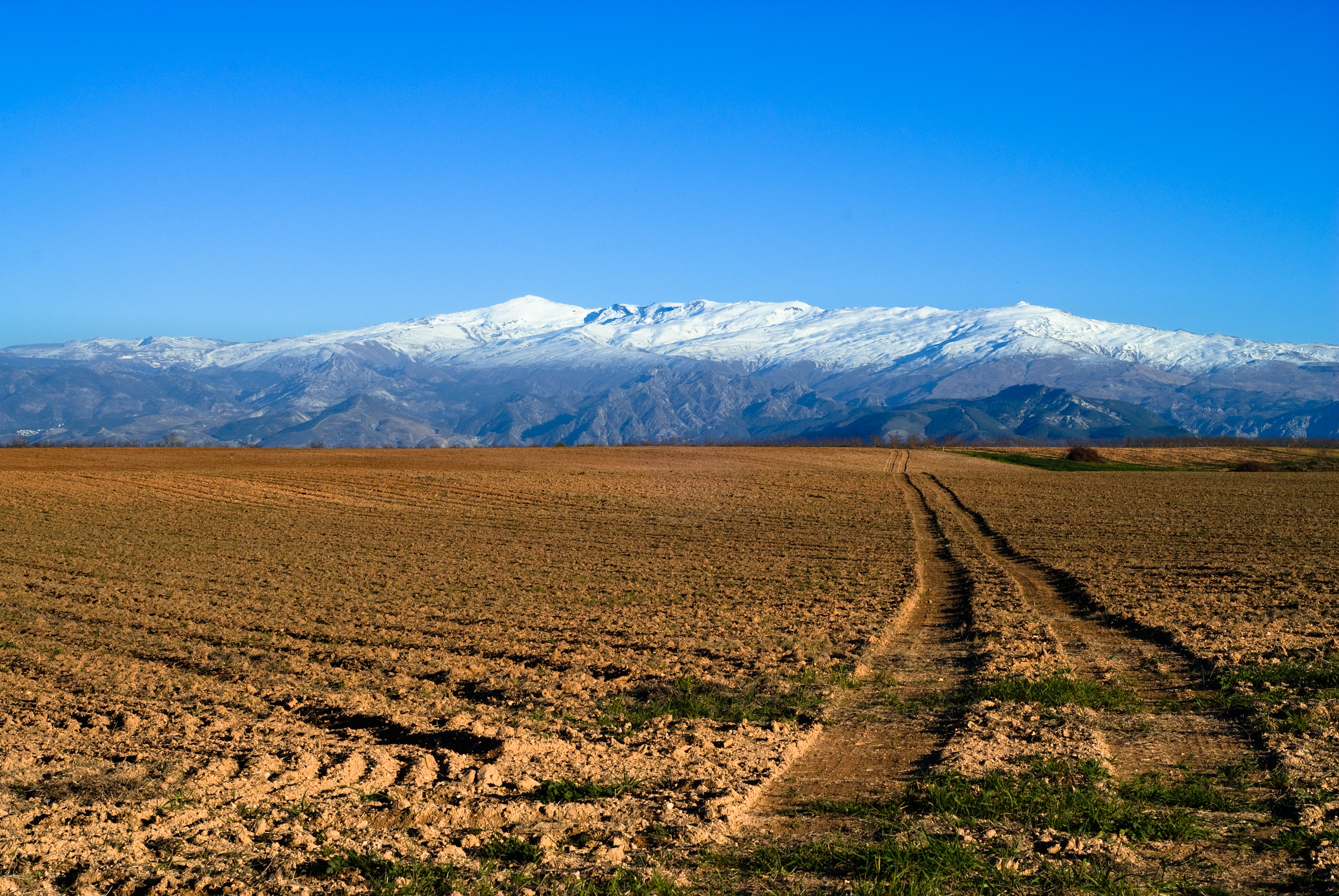 Sierra Nevada (Spain)